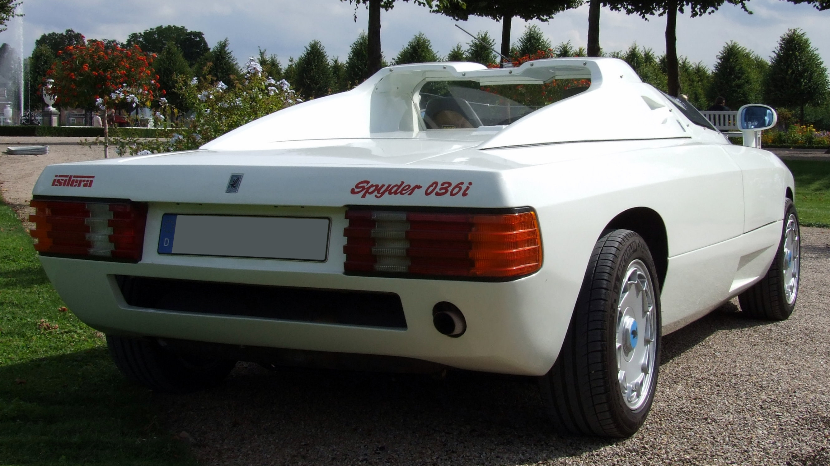 Isdera Spyder 036i (1982-1992)